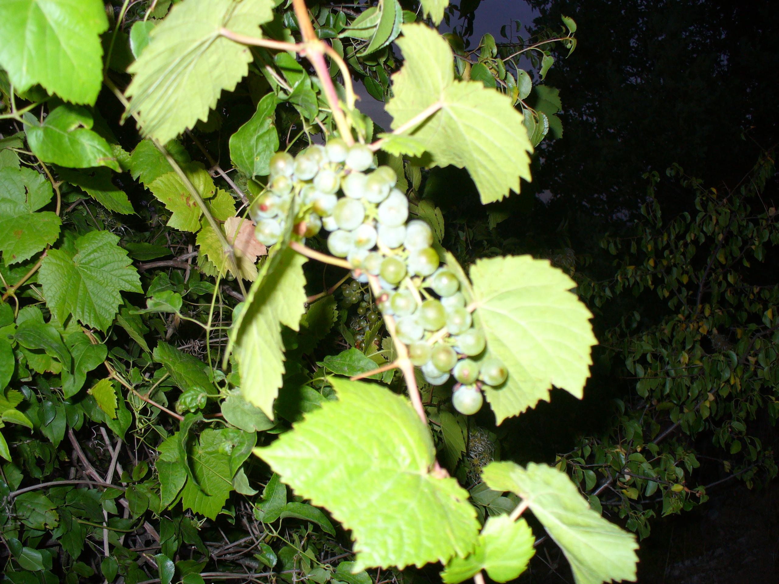 uva pecorino